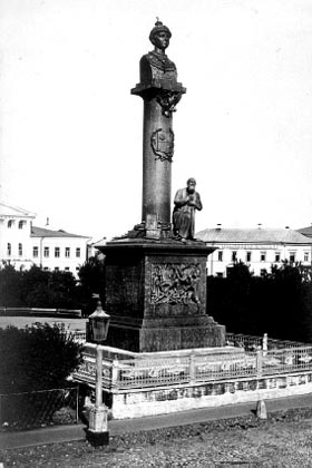 Памятник Михаилу Фёдоровичу и Ивану Сусанину в Костроме. Снесён в 1917 году